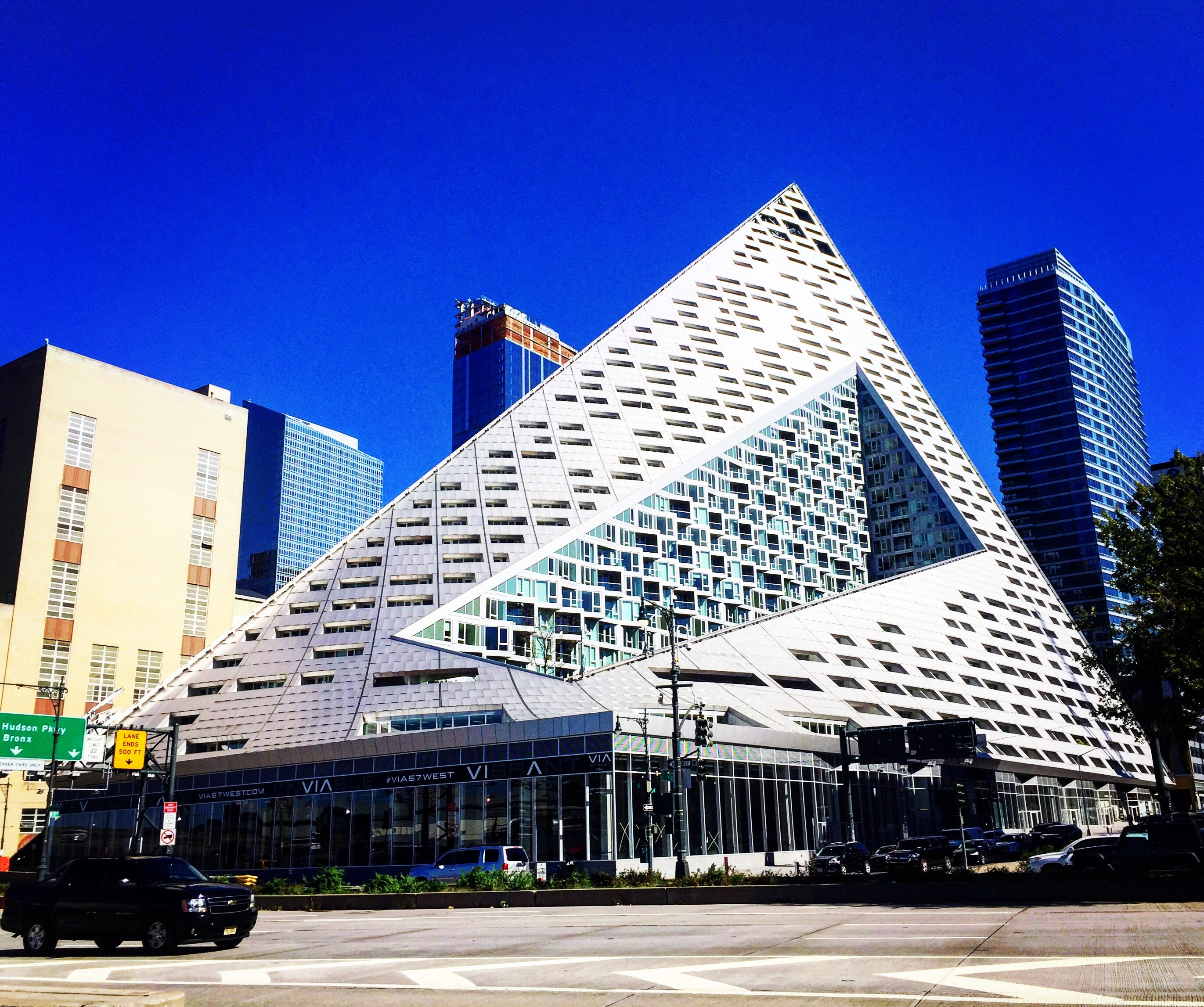 Site: VIA 57 West